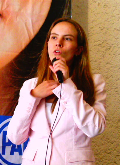 Foto de Gabriela Cuevas Barrón